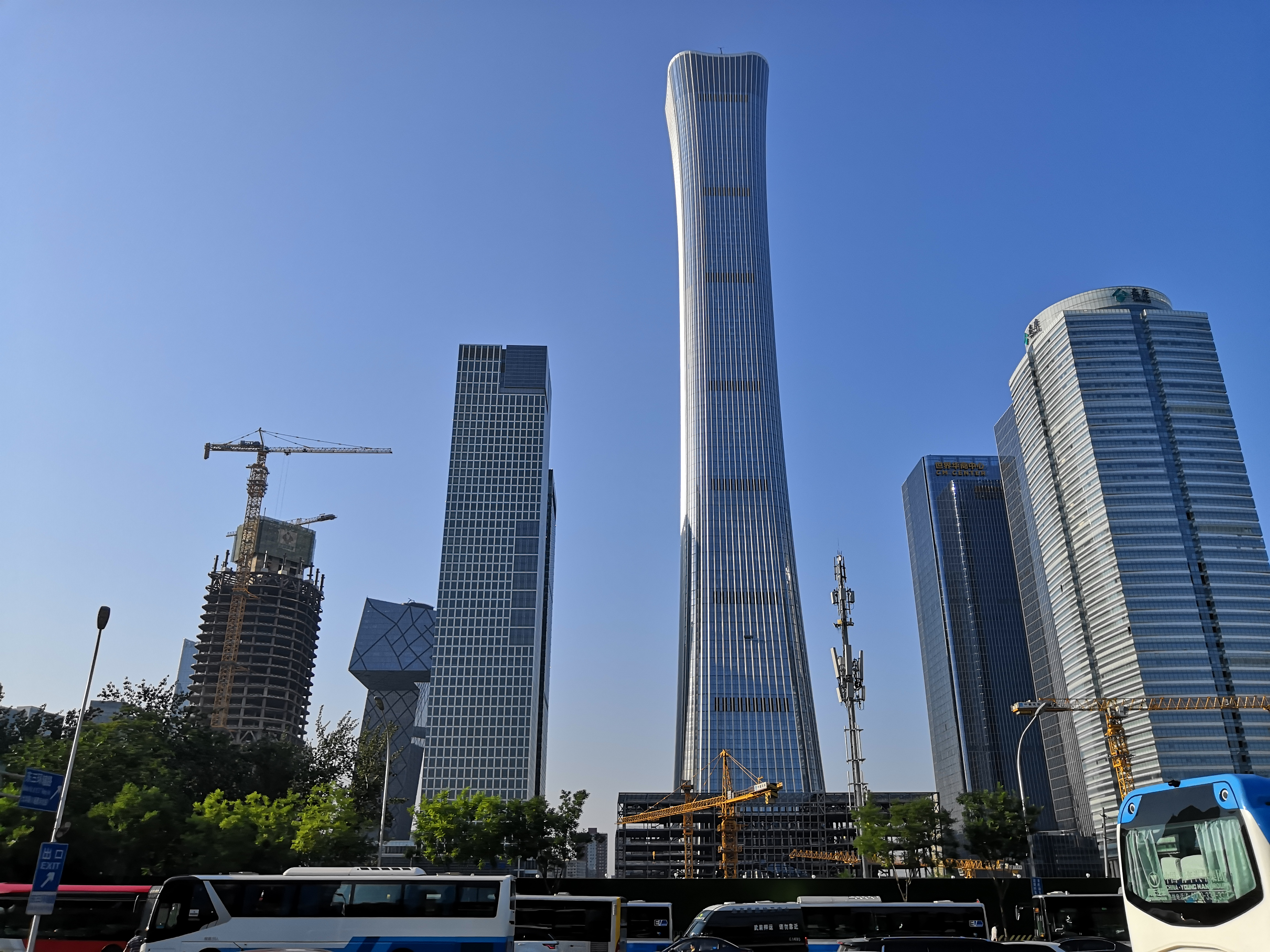 中文（中国大陆）: 中国尊 2019-7